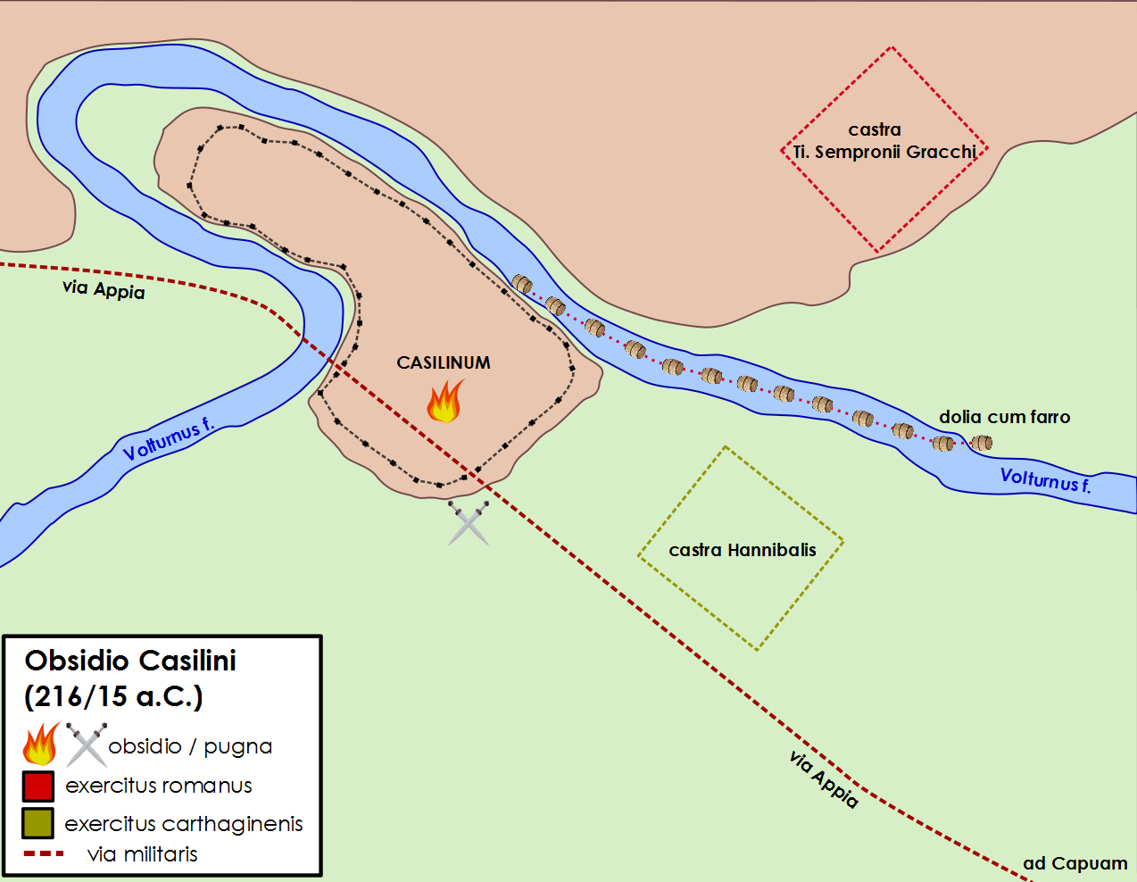 Assedio di Taranto da parte di Annibale nel 216-215 a.C.